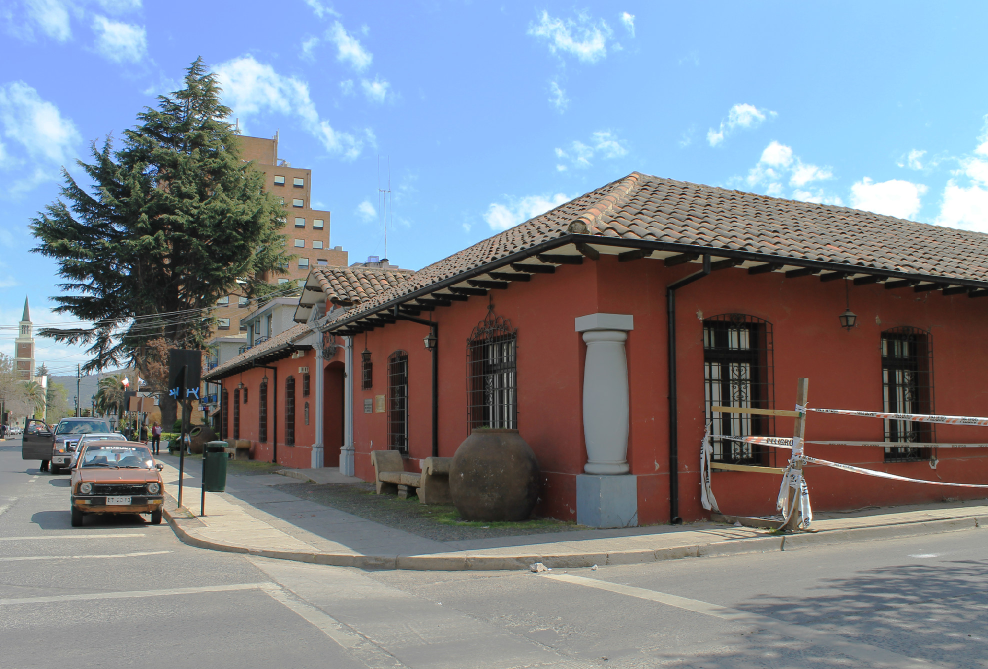 Casa de la Independencia This is a photo of a national monument in Chile: 144